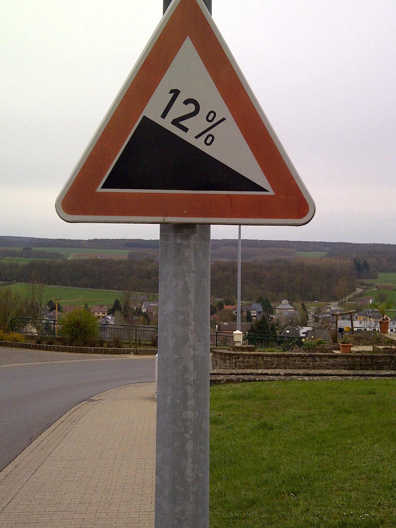 Verkéiersschëld A,2 aus dem lëtzebuerger Code de la Route "Descente dangereuse"